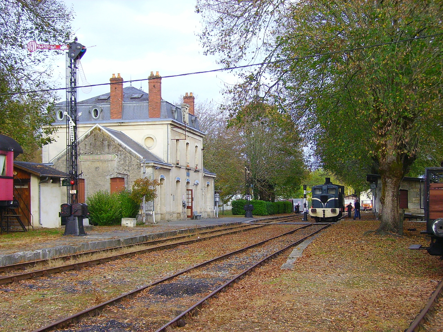 La gare de Guîtres (Gironde) le 15 octobre 2008.